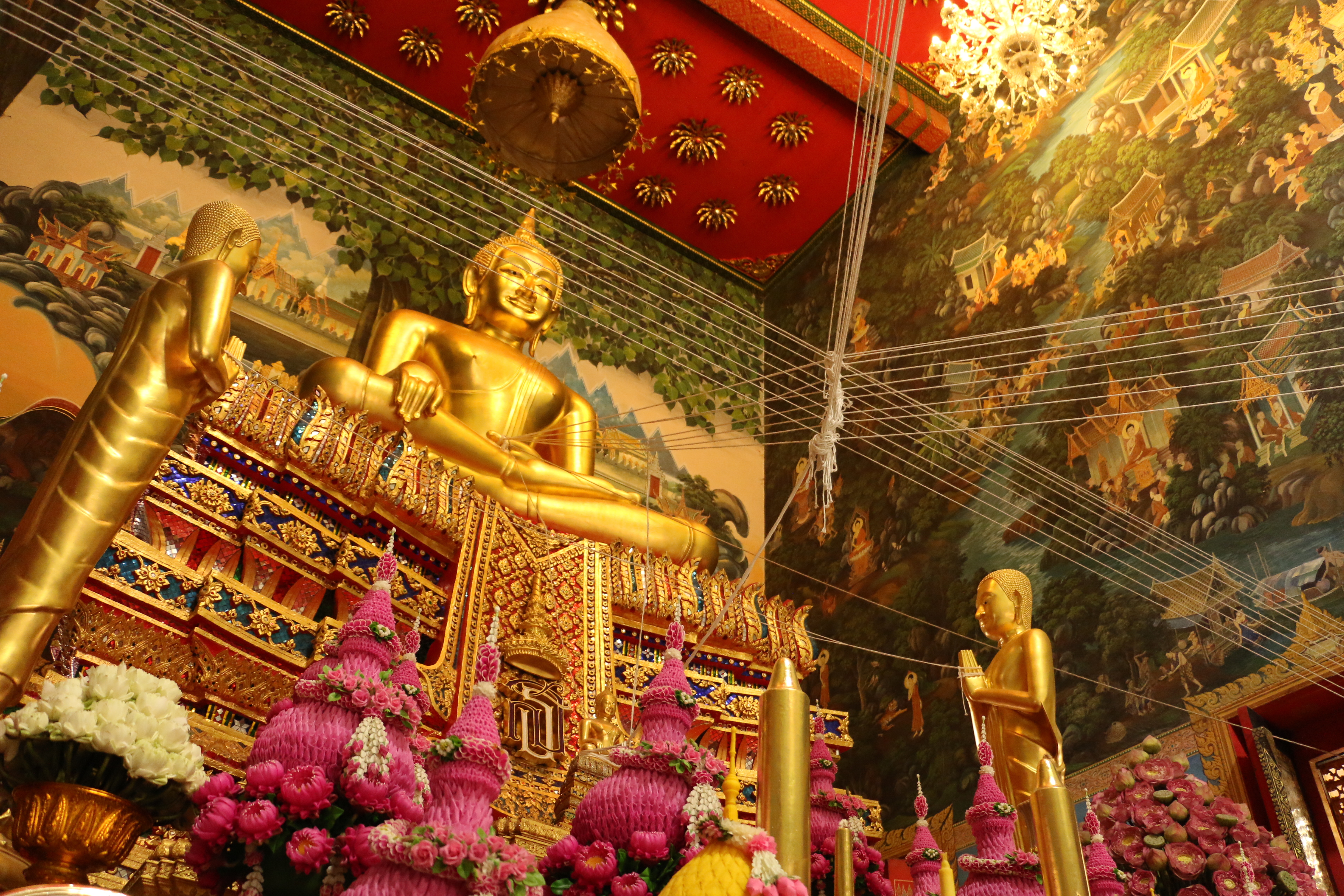 วัดไร่ขิง พระอารามหลวง